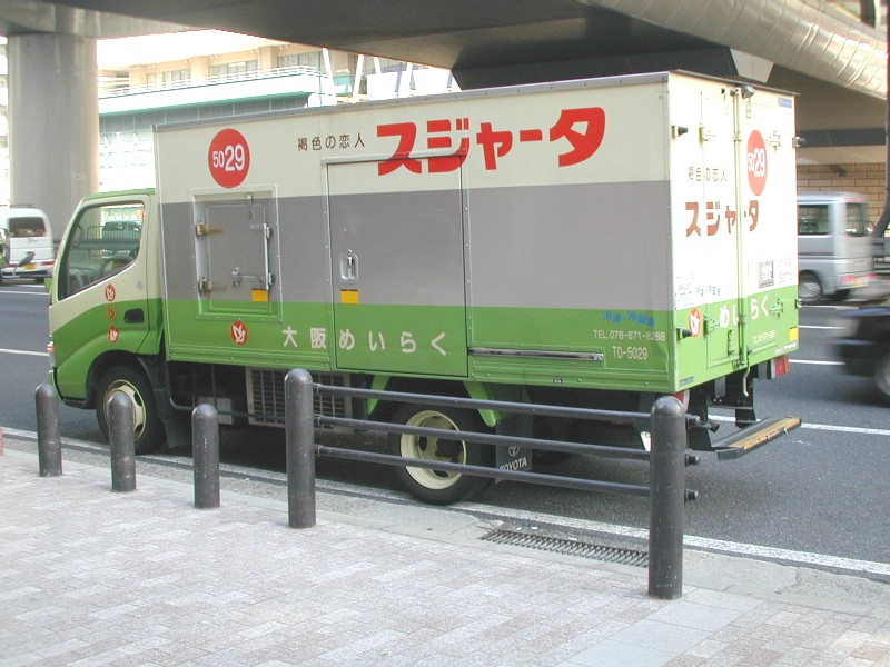 スジャータトラック